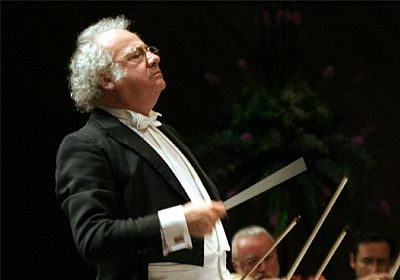 Fotografía del director de orquesta Fernando Lozano en licencia libre.